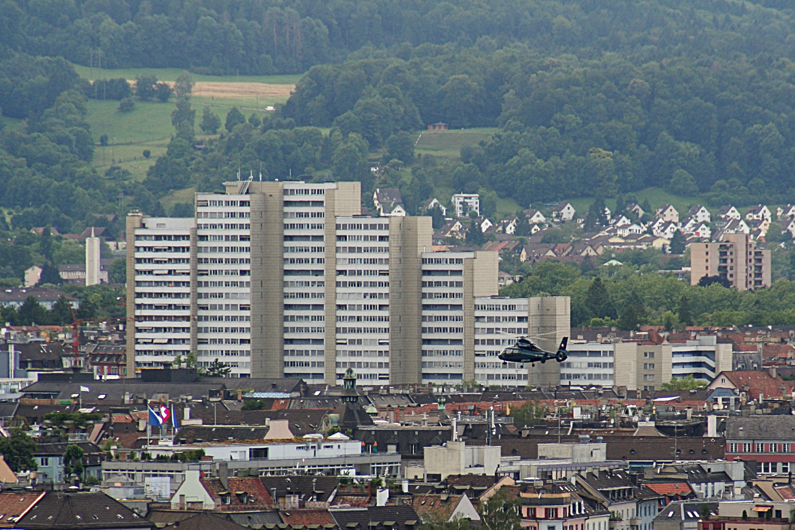 Hochhaus Wohnsiedlung Lochergut in Zürich, SchweizStandpunkt Terrasse CLA Gebäude der ETH